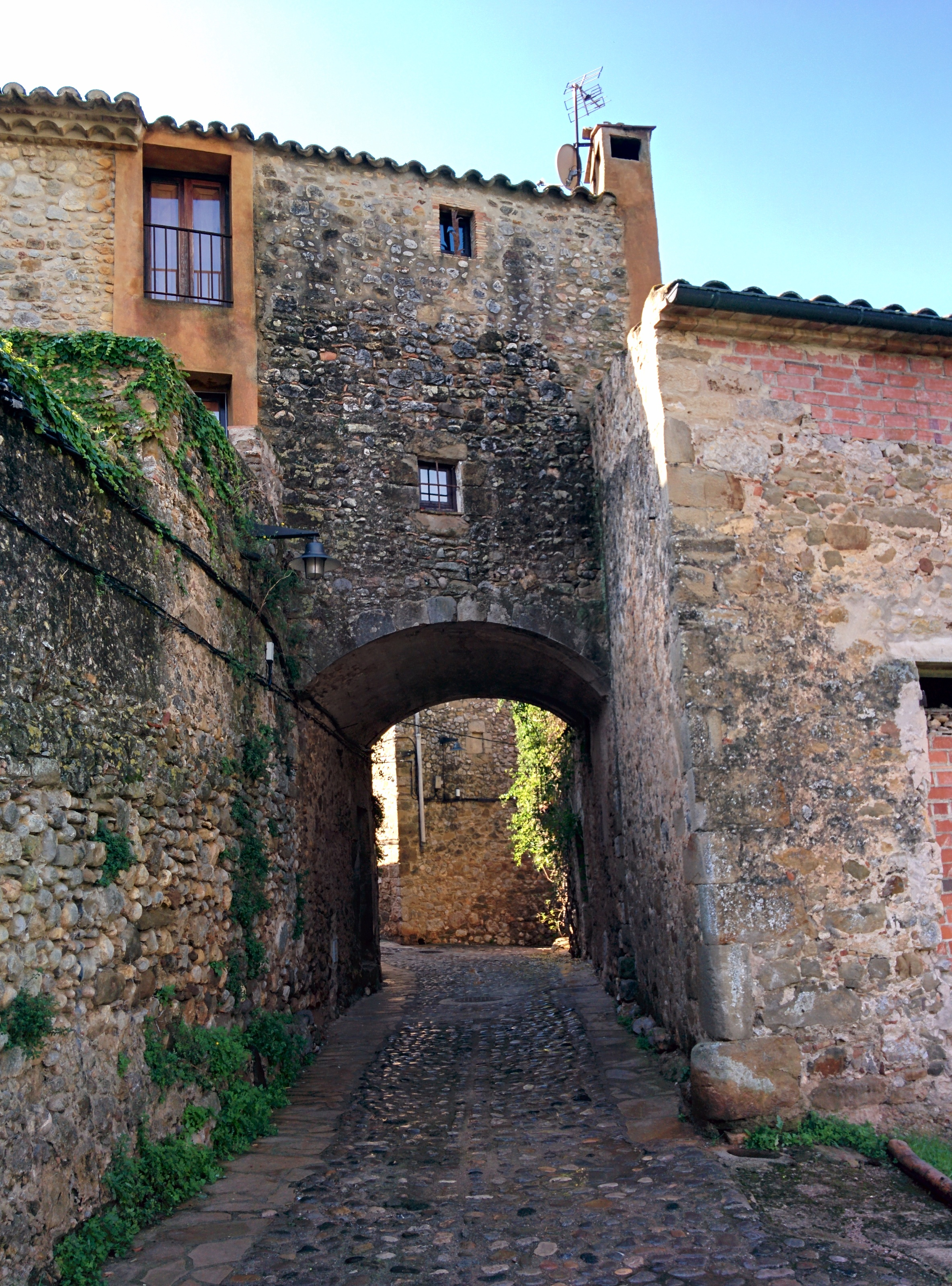 Portal Nord (Saus, Camallera i Llampaies)